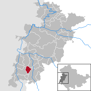 Oechsen in Thuringia - Wartburgkreis